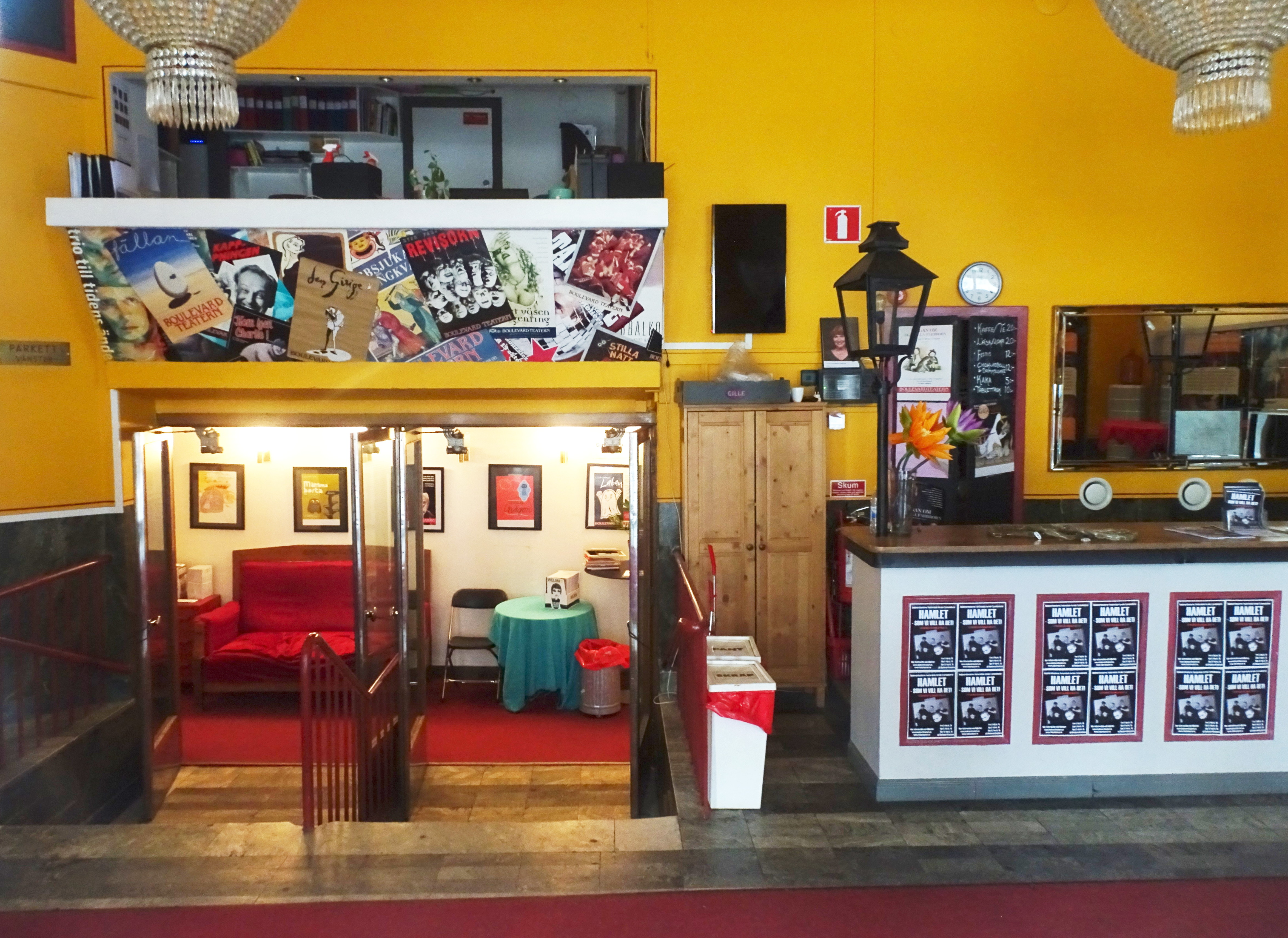 Boulevardteatern